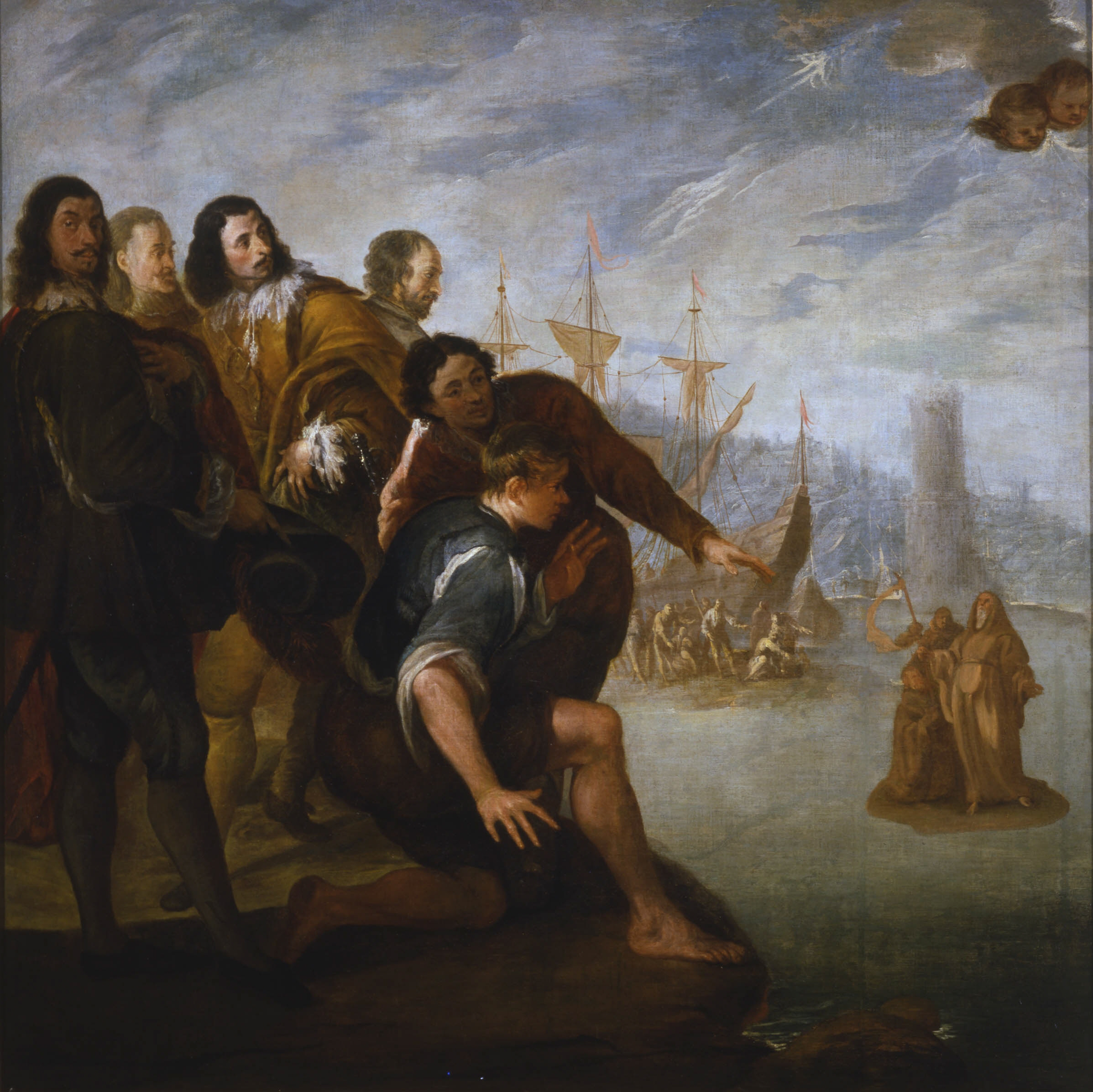 La obra representa a San Francisco de Paula (1416-1507), navegando sobre su propia capa.